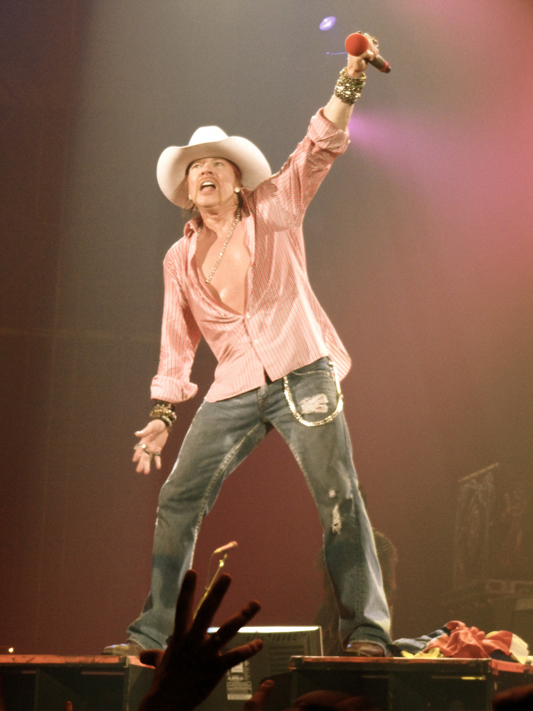 Más, mucho más en